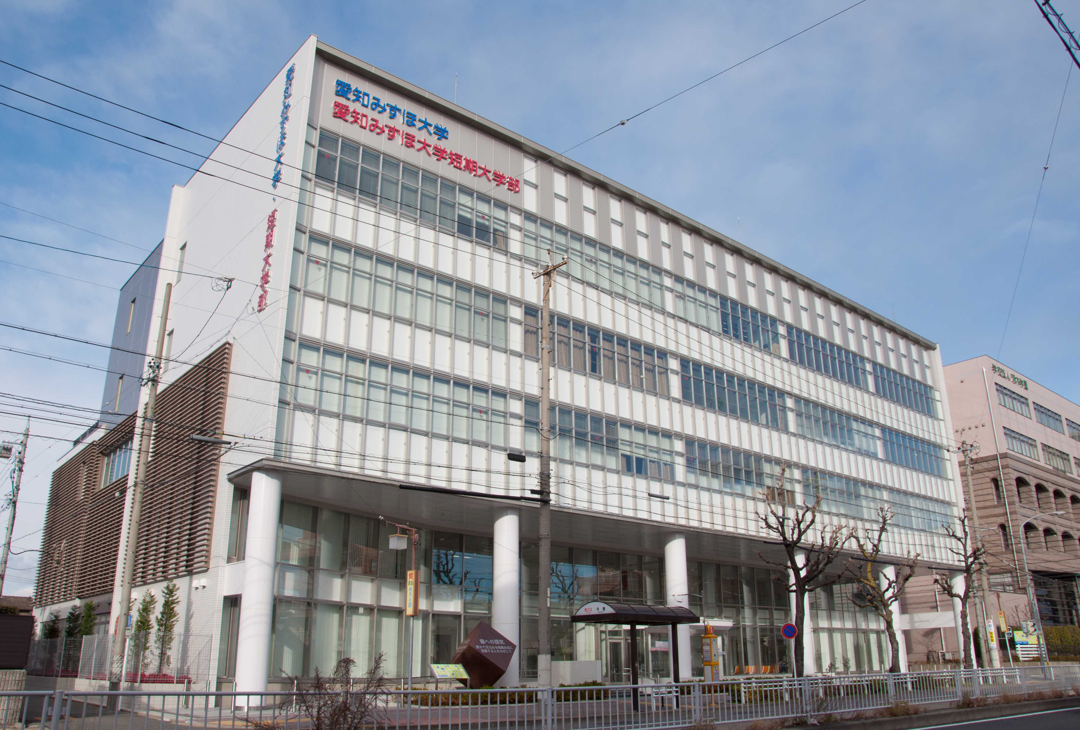 愛知みずほ大学短期大学部学舎